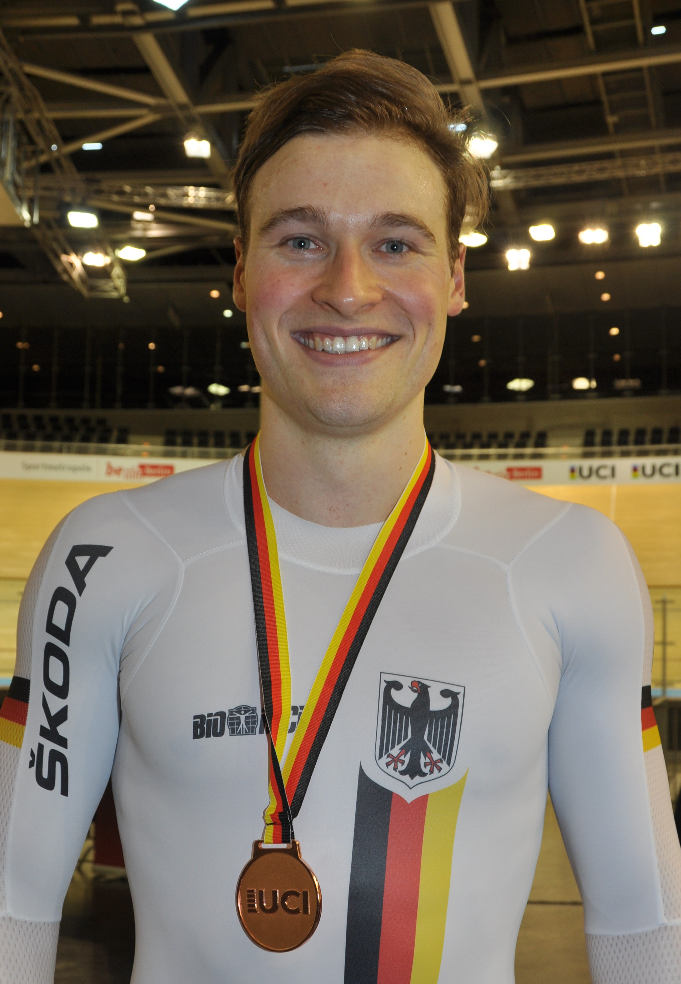 Stefan Bötticher, deutscher Radsportler - Bronze im Teamsprint